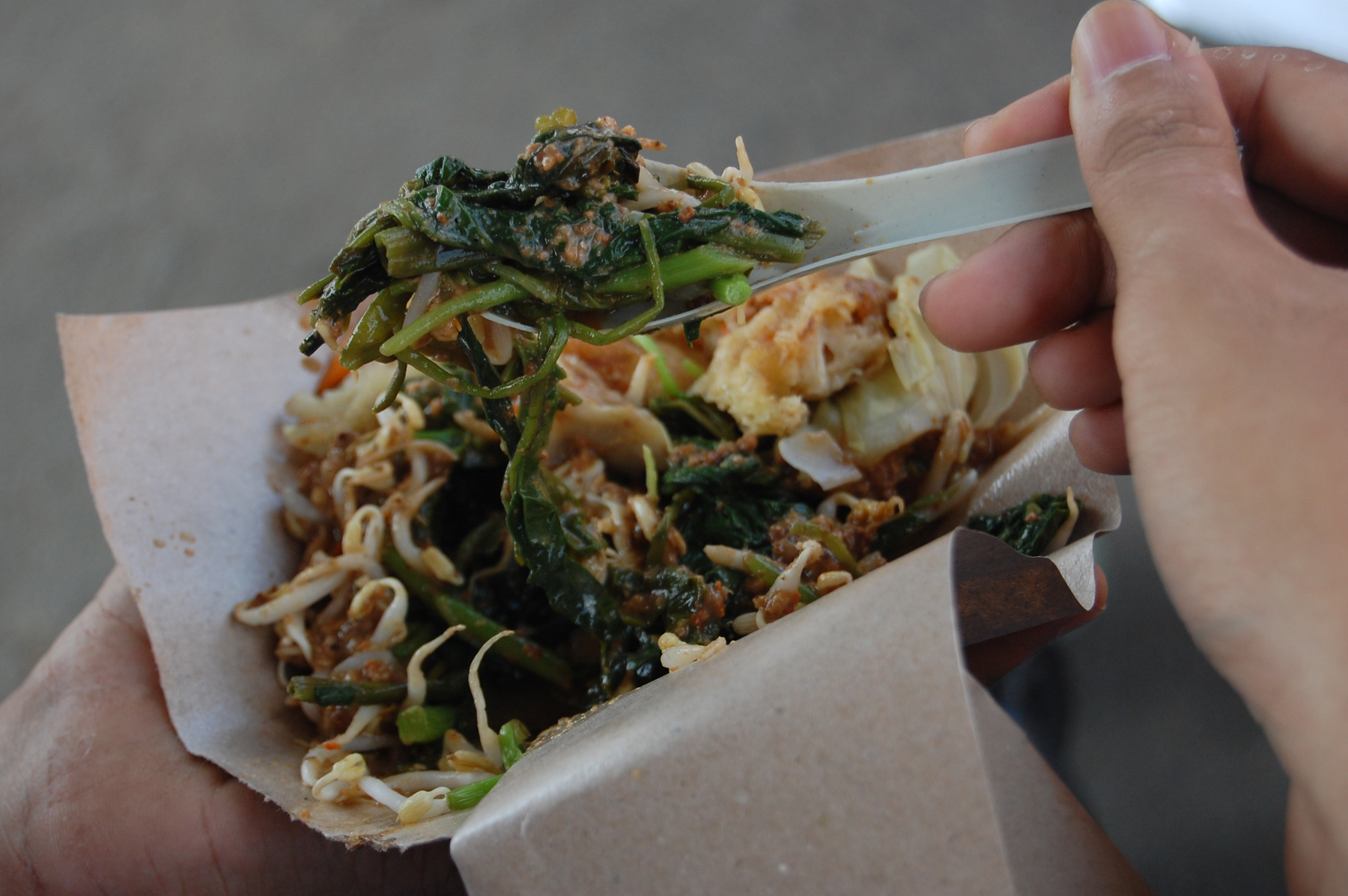 Pecel, campuran sayuran dan bahan lain dengan bumbu kacang yang biasanya pedas